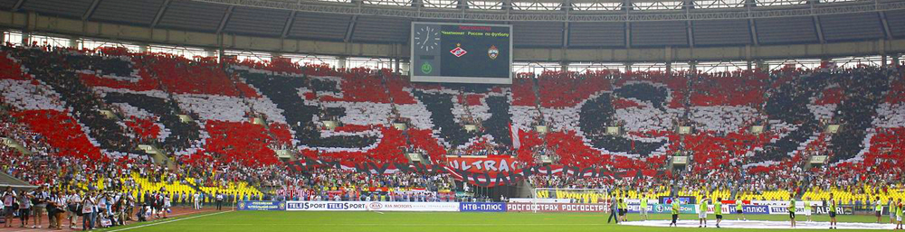 Перфоманс "Бейся" в матче с ЦСКА. Сезон 2010 года